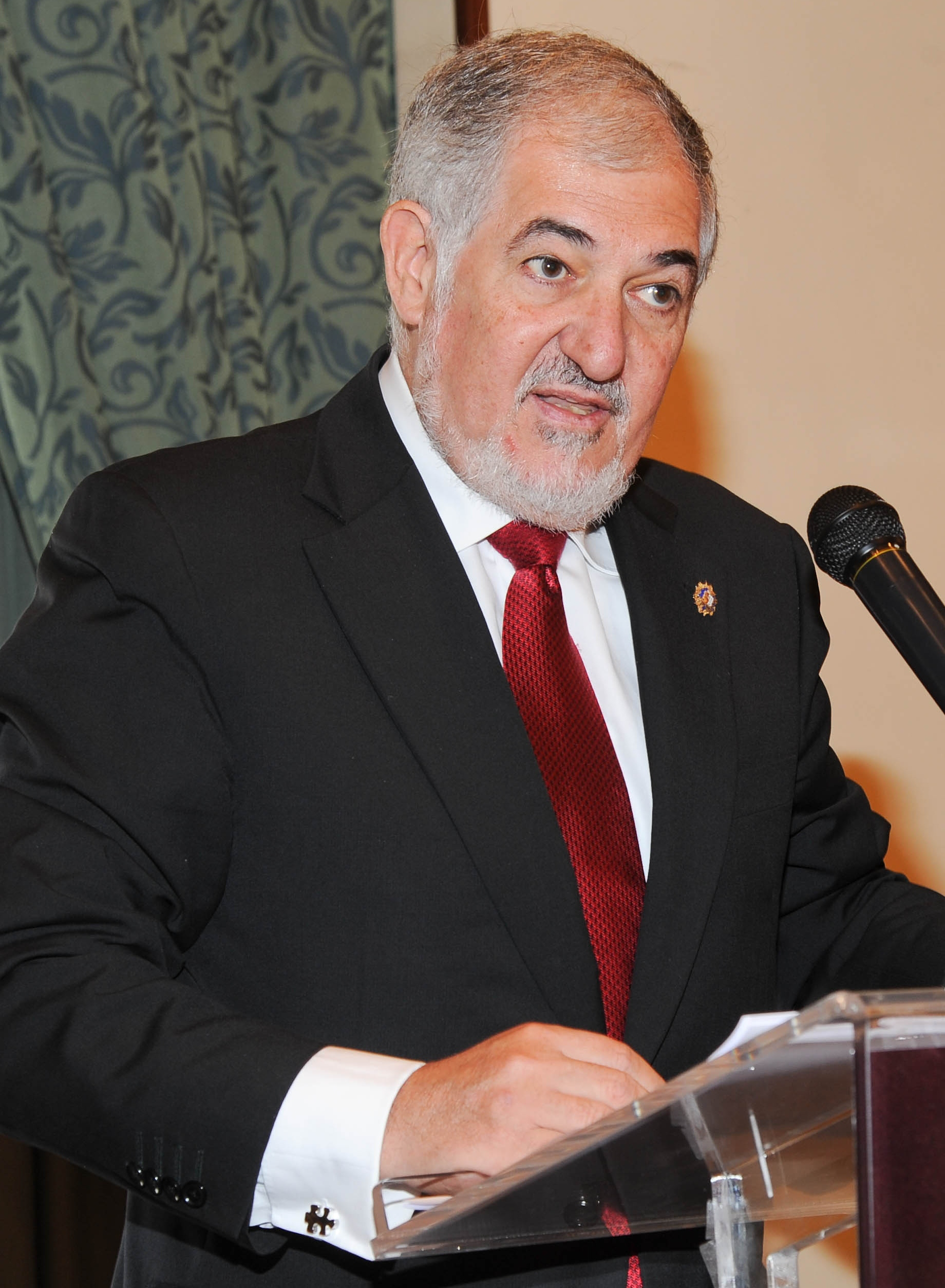 Cándido Conde-Pumpido Tourón